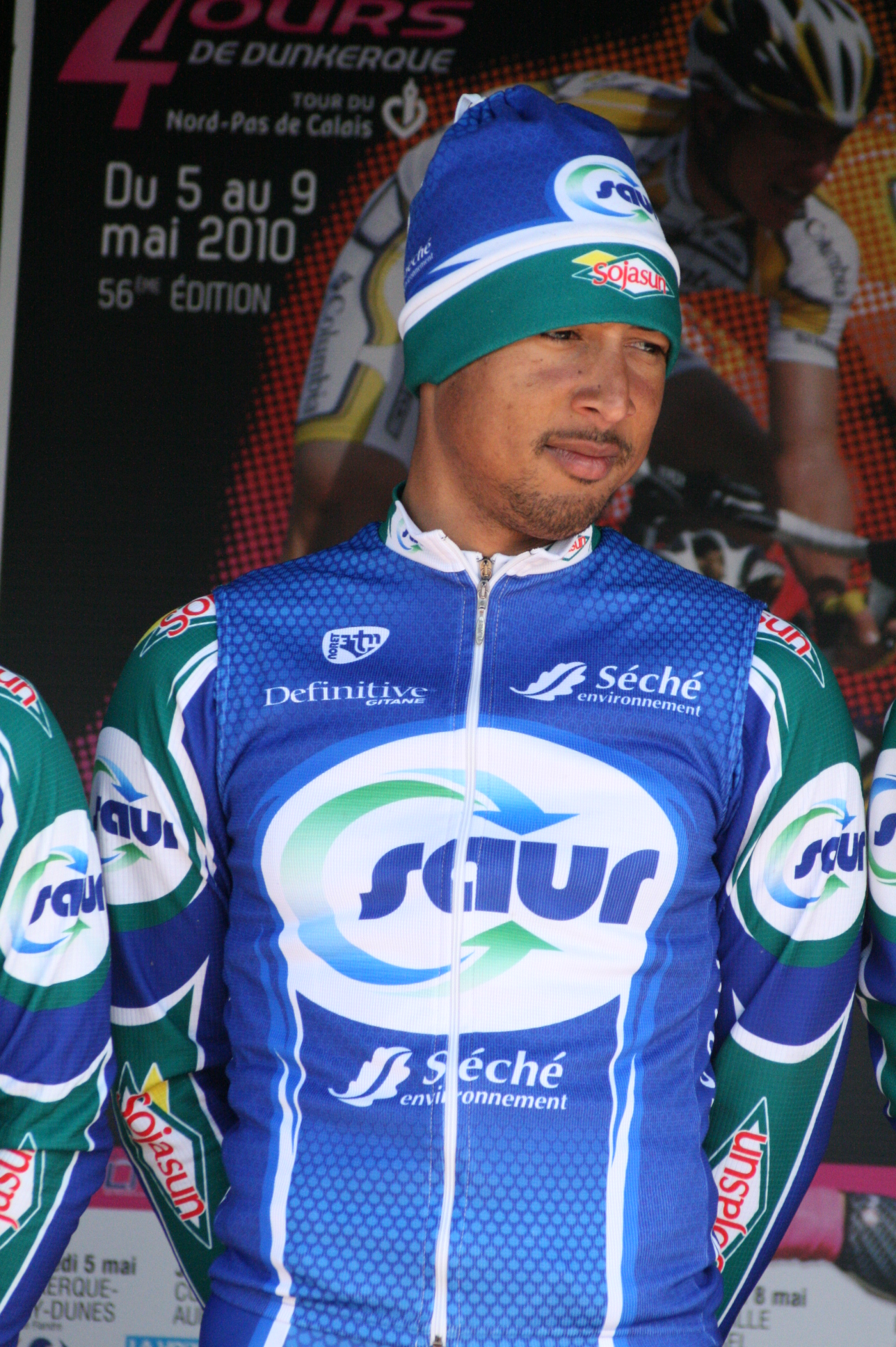 Rony Martias, lors de la présentation des équipes des 4 jours de Dunkerque 2010